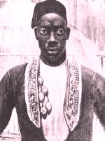 Мтеза